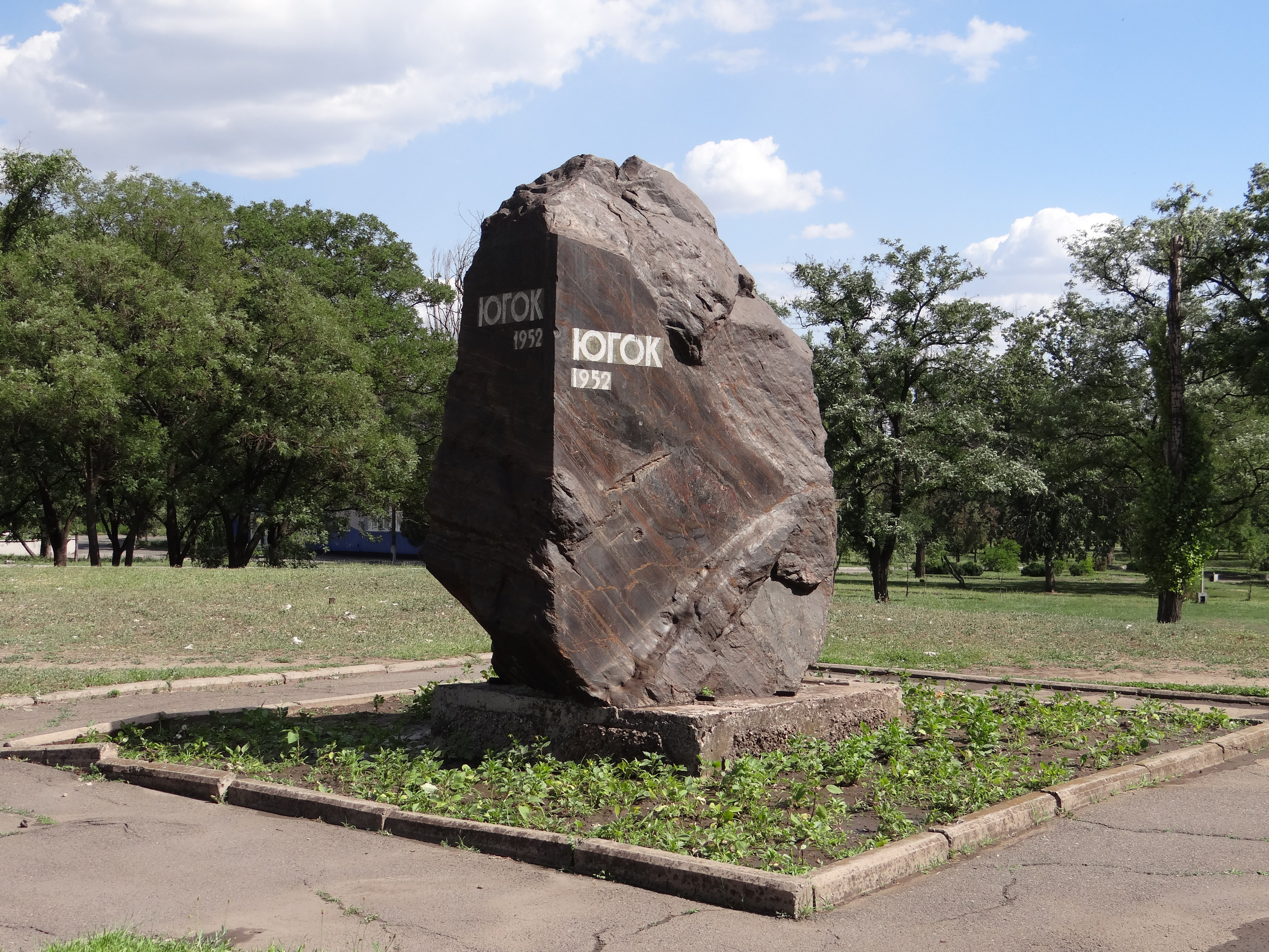 Пам’ятний знак на честь 10-ти річчя Південного ГЗК, Кривий Ріг, вул. Ярославська